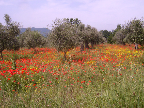 Luigi Bruno Di Cosmo; fonte: opera propria; descrizione: S. Angelo d'Alife. Contrada Melopiano. Uliveto in primavera; licenza d'uso: Pubblico Dominio